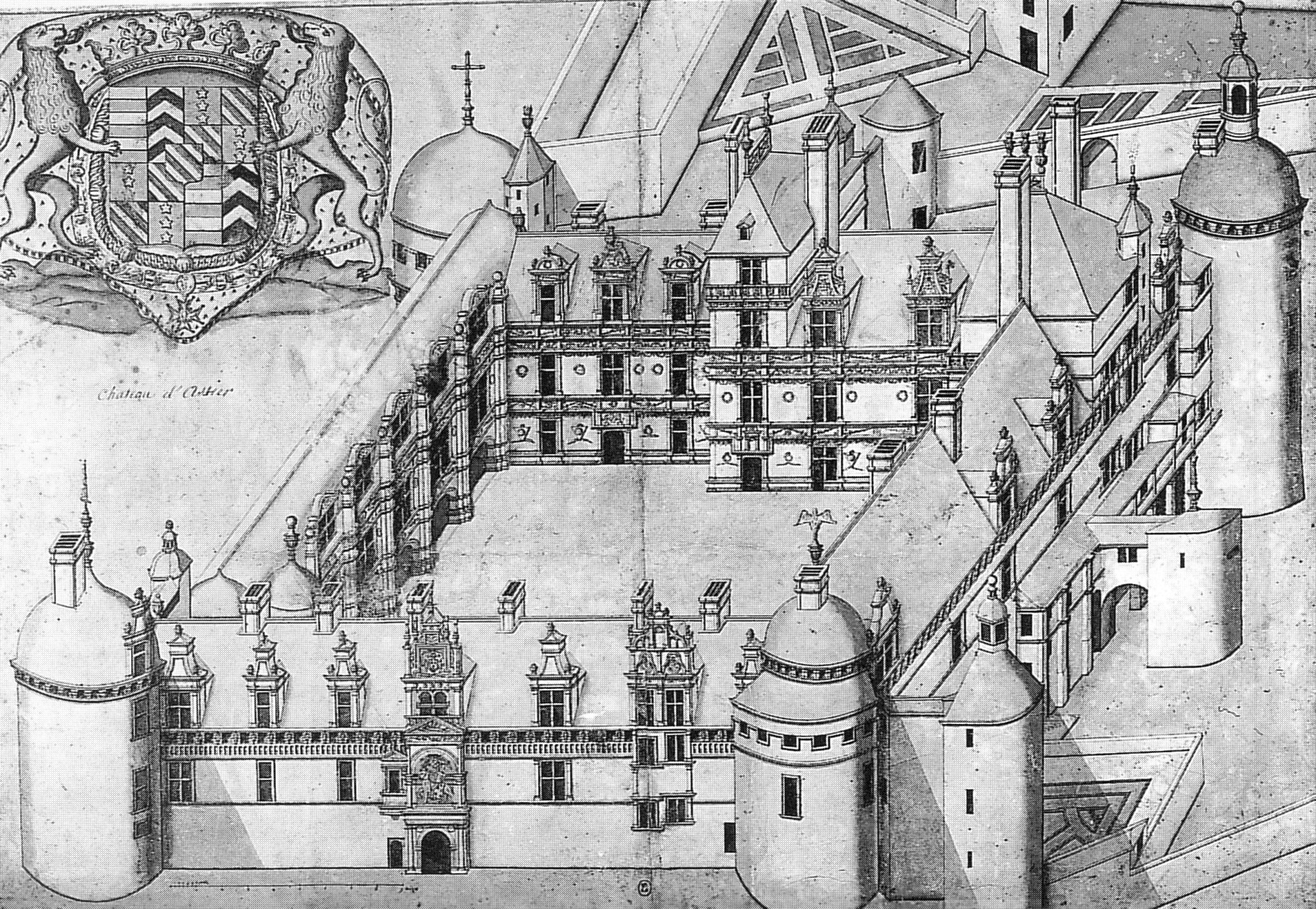 Zeichnung des Schlosses Assier zur Zeit der Renaissance